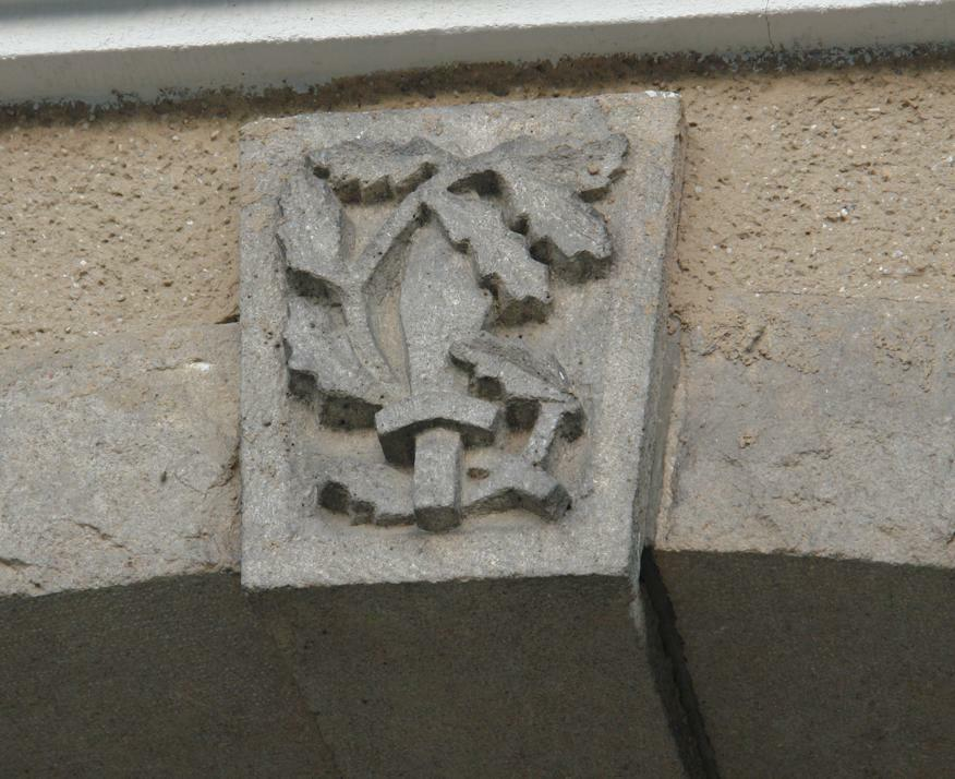 Detail am Gebäude der Luftkriegsschule (Eichenblatt mit Dolch)